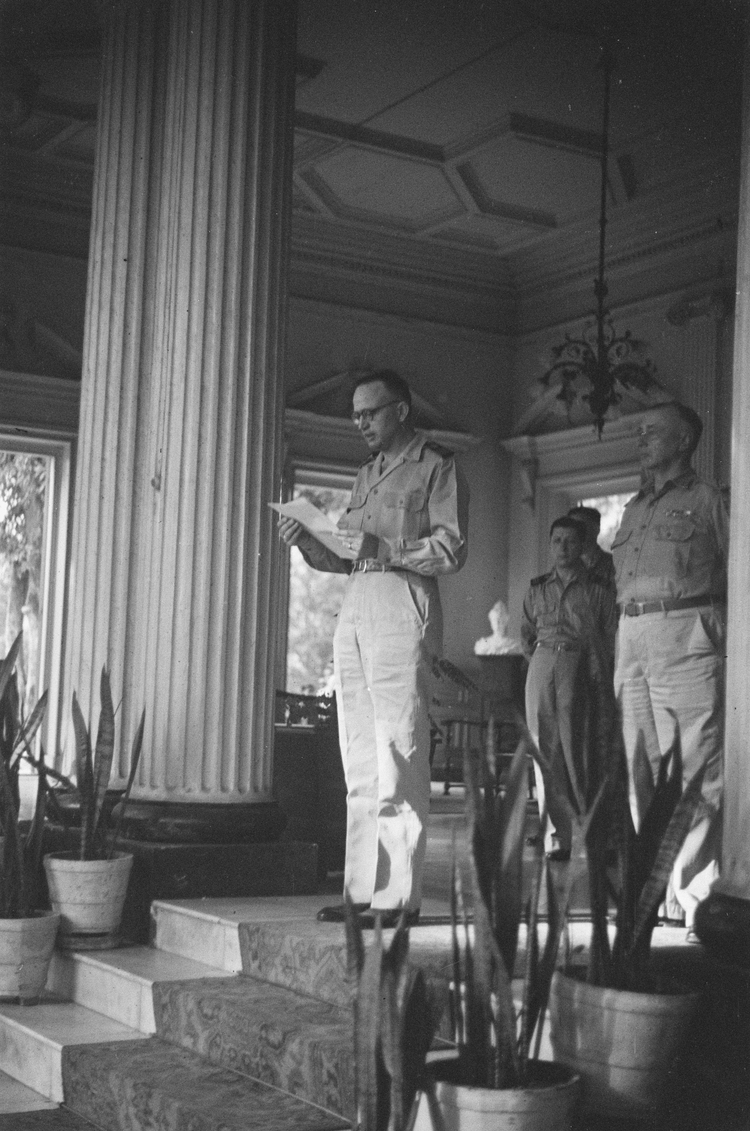 Collectie / Archief : Fotocollectie Dienst voor Legercontacten Indonesië Reportage / Serie : [DLC] Massademonstratie te Medan Beschrijving : Medan: De Recomba voor Noord-Sumatra, Dr. J.J. v.d. Velde, beantwoordt namens de Ned. Ind. Regeering het verzoekschrift van de autochtone bevolking van Oost-Sumatra, waarin voor dit gewest onafhankelijkheid in het kader van de overeenkomst van Linggadjati wordt gevraagd. Duizenden Sumatranen waren samengestroomd om te getuigen van hun vaste wil tot opbouw van den Vereenigde Staten van Indonesie in samenwerking met Nederland. Datum : 3 augustus 1947 Locatie : Indonesië, Medan, Nederlands-Indië, Sumatra Fotograaf : Kalken, van / DLC Auteursrechthebbende : Nationaal Archief Materiaalsoort : Negatief (zwart/wit) Nummer archiefinventaris : bekijk toegang 2.24.04.03 Bestanddeelnummer : 327-1-5